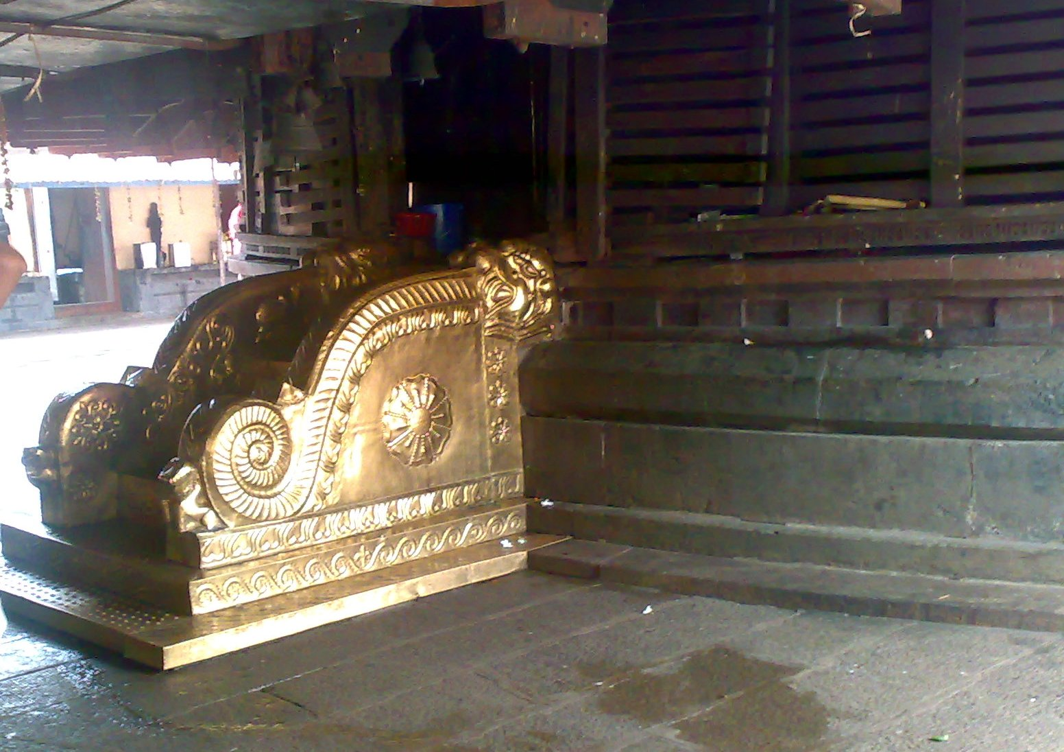 വാഴപ്പള്ളി മഹാക്ഷേത്രത്തിലെ മഹാദേവ ശ്രീകോവില്‍